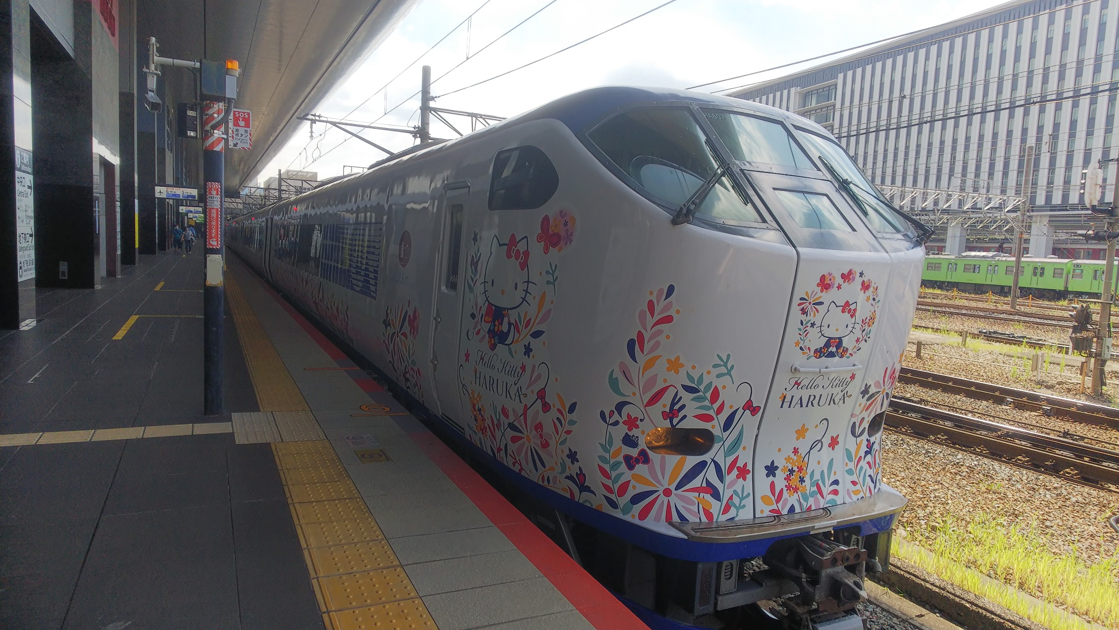 HARUKA(京都駅）